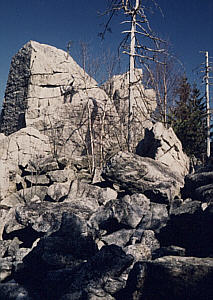 Granitfelsgruppe Zipfeltannenfelsen im Steinwald Fotograf: Walter J. Pilsak, Waldsassen Copyright Status: GNU Freie Dokumentationslizenz